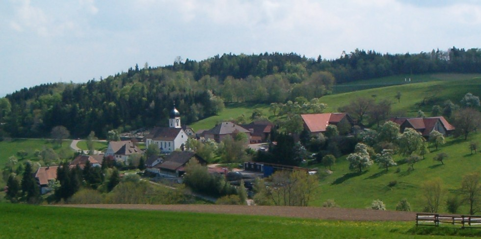 Ortschaft Gaiß-Waldkirch: Ortsteil Waldkirch am Übergang des Hochrheintales zu den Höhen des Schwarzwaldes. Aufnahme vom 07. Mai 2006.